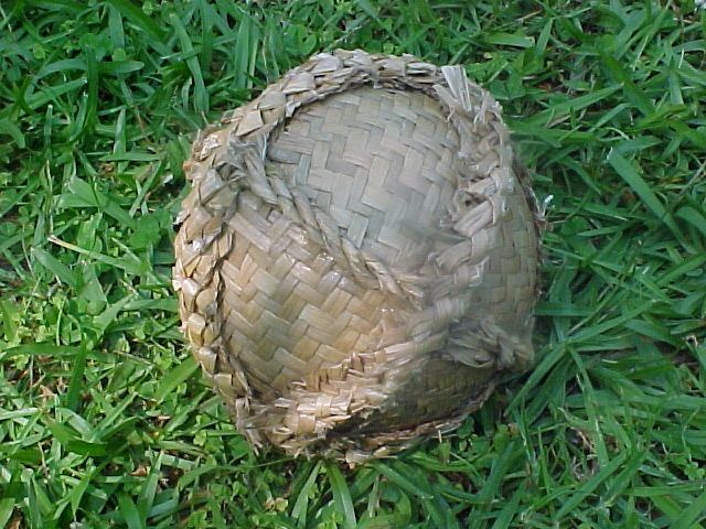 traditional ki-o-rahi ball